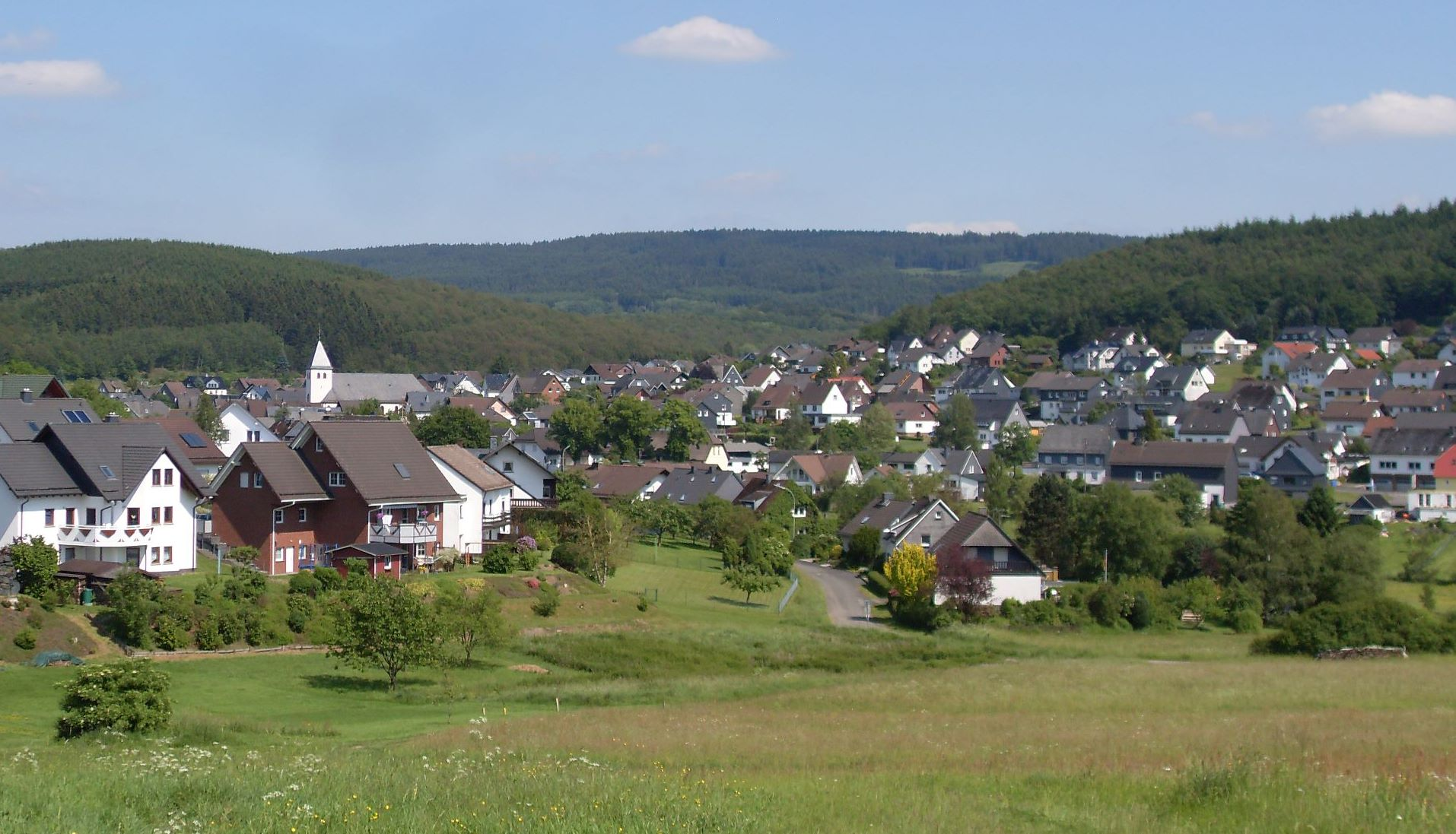 Gernsdorf Blickrichtung von Westen, Ortskern mit katholischer Kirche im Jahr 2017